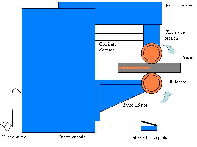 Esquema del funcionamiento maquinaria proceso soldadura por roldanas o costura